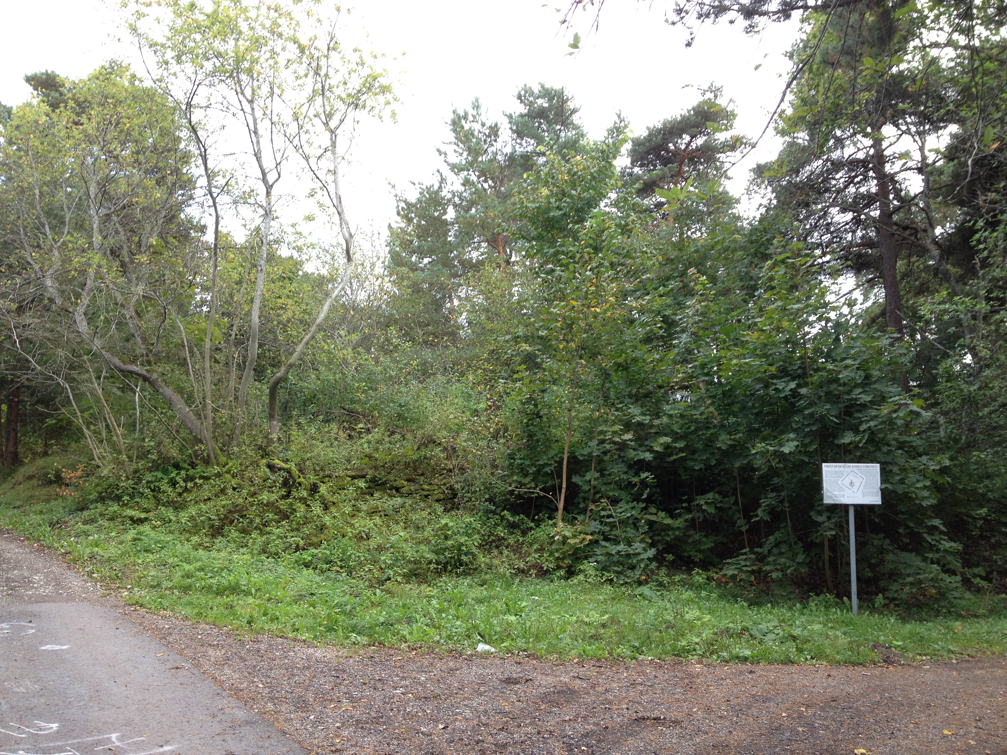 Sakraalehitise varemed piirdeaiaga